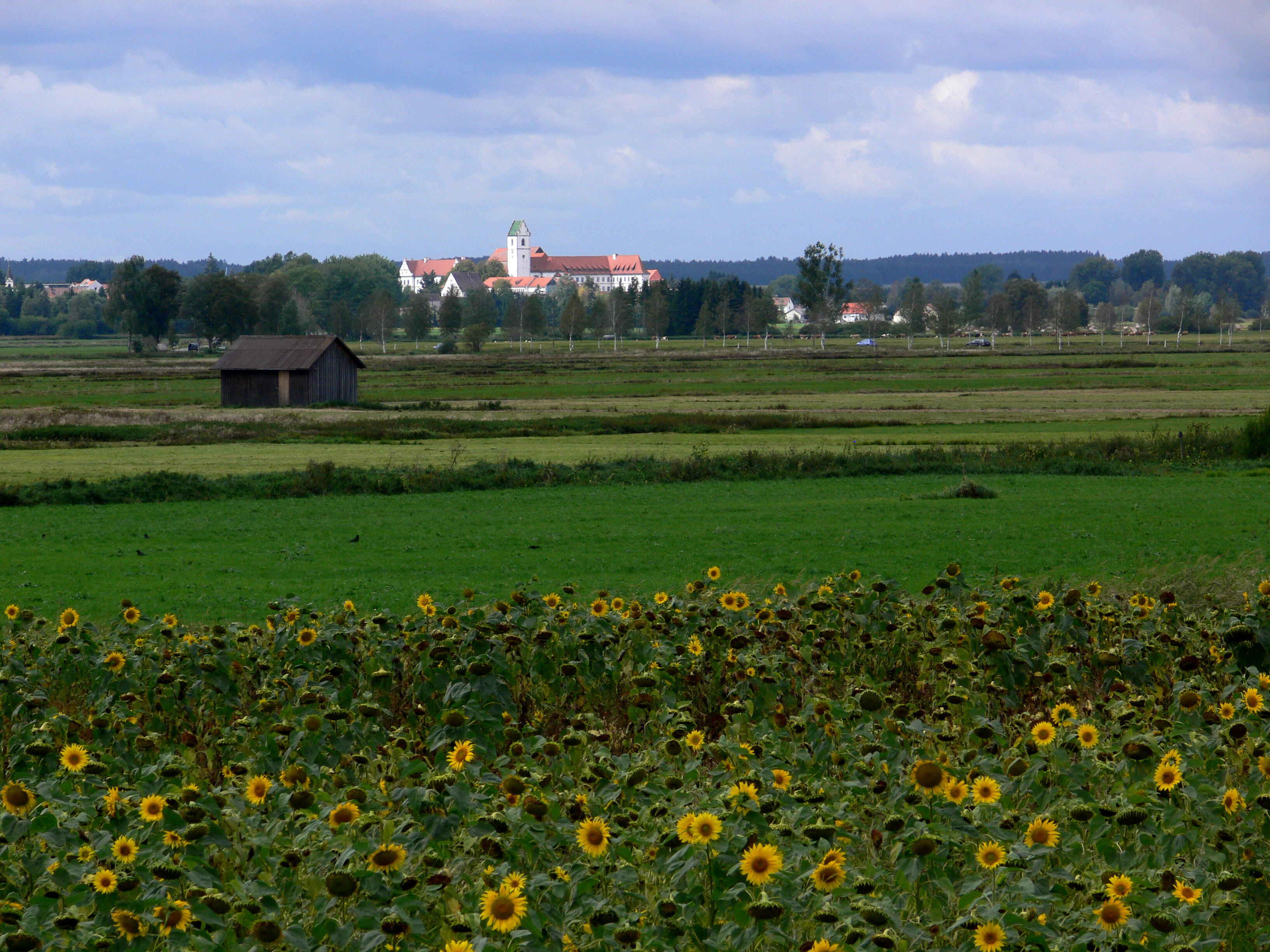 Skulpturenfeld Oggelshausen, Landkreis Biberach Blick nach Bad Buchau (ehem. Stift Bad Buchau mit ehem. Stiftskirche)